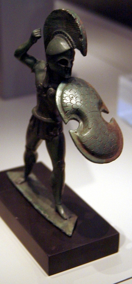 Schwertkämpfer, Aufsatzfigur eines Bronzekessels, um 540/30 v. Chr., aus dem Zeus-Heiligtum von Dodona, Antikensammlung im Alten Museum Berlin